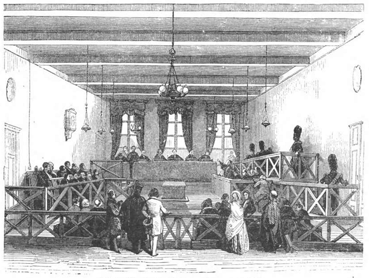 Sitzungssaal des Assisengerichts in Brüssel.